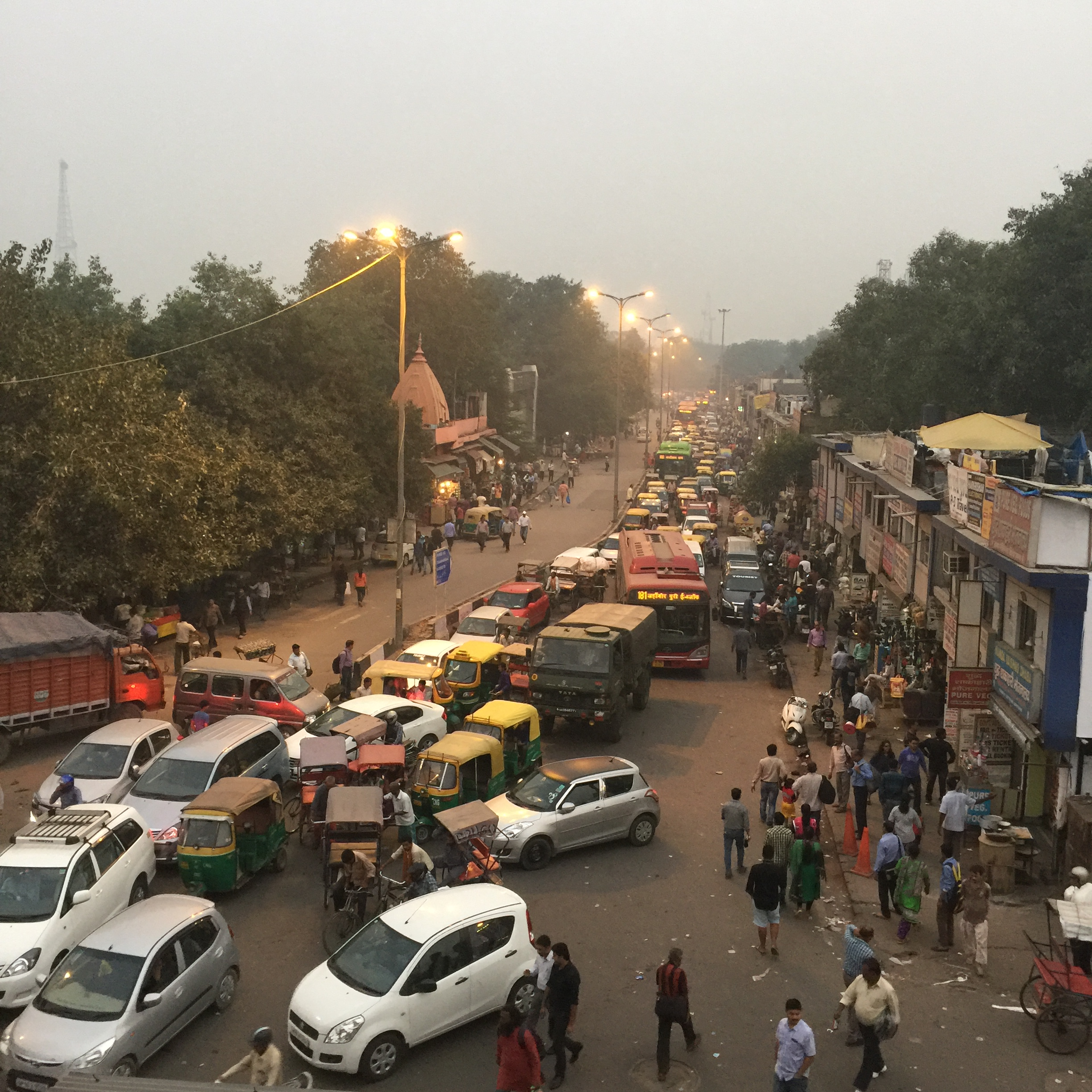 Ratan Lal Market, Kaseru Walan, Paharganj, New Delhi, Delhi, India